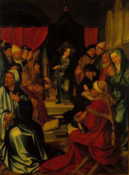 Quer este painel, quer os outros que compunham o retábulo dito de São Bento - a Visitação, a Adoração dos Magos, a Apresentação do Menino no Templo, todos no Museu Nacional de Arte Antiga, assim como o desaparecido Cristo deposto da Cruz - perteciam ao conjunto retabular da Capela do Salvador da Igreja do Convento de São Francisco, em Lisboa. Daí transitaram no século XVII para a Capela de Nossa Senhora dos Prazeres do Mosteiro de São Bento da Saúde e, com a extinção das ordens religiosas em 1834, para a Academia Real de Belas Artes, de onde passaram para o Museu Nacional de Arte Antiga. Adriano de Gusmão publicou um documento de 17 de Maio de 1525, descoberto por Vitorino Magalhães Godinho (Torre do Tombo, Corpo Cronológico, Parte II, maço 125, nº 150), de acordo com o qual os pintores de Lisboa Jorge Leal e Gregório Lopes tinham acabado de pintar o retábulo para a Capela do Salvador do Mosteiro de São Francisco, trabalho que iria ser avaliado por Jorge Afonso (pintor régio) e por Antão Leitão (pintor do Senado). Com base neste testemunho, a que se junta, igualmente, o documento encontrado por Reinaldo dos Santos na Torre do Tombo e que pertencia a um Livro de Notas do Mosteiro de São Bento da Saúde (Códice nº 21 do Cartório de São Bento), pôde-se determinar tanto a autoria/parceria da obra, como a sua data de execução.